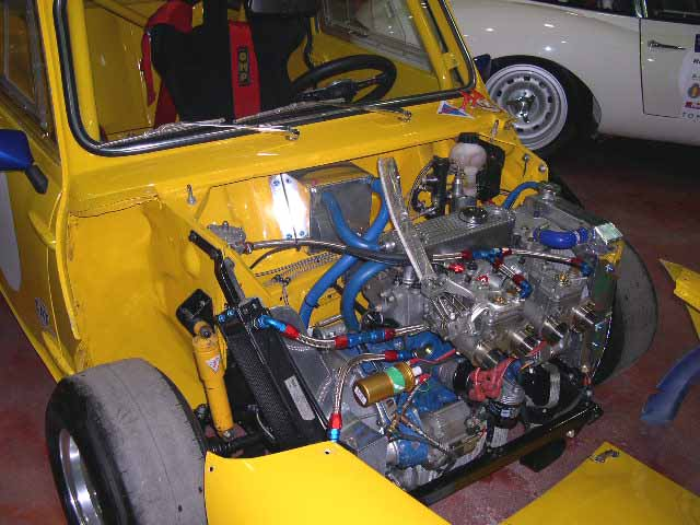 Motor trasvesal. Mini Cooper prototipo con frontal desmontable Mini Cooper S (prototipo con frontal desmontable)